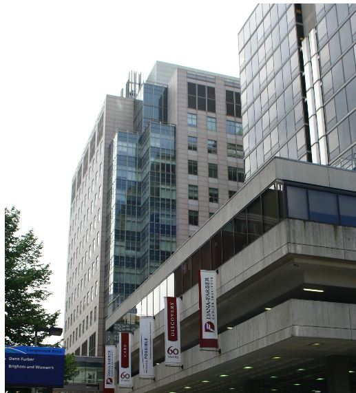 Le Centre de recherche sur le cancer Dana-Farber, à Boston, Massachusetts.